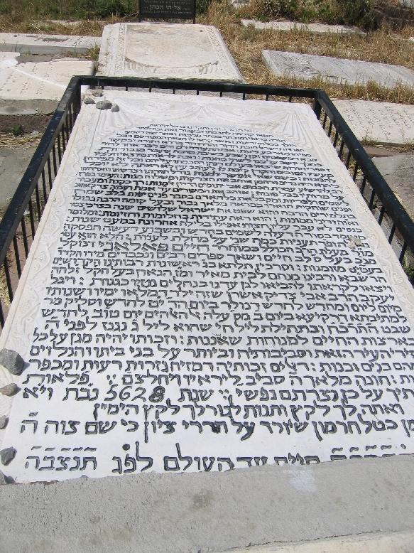 תמונת מצבת קברו של ר' חיים פלאג'י